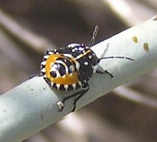 Stenozygum coloratum Larva, from Israel